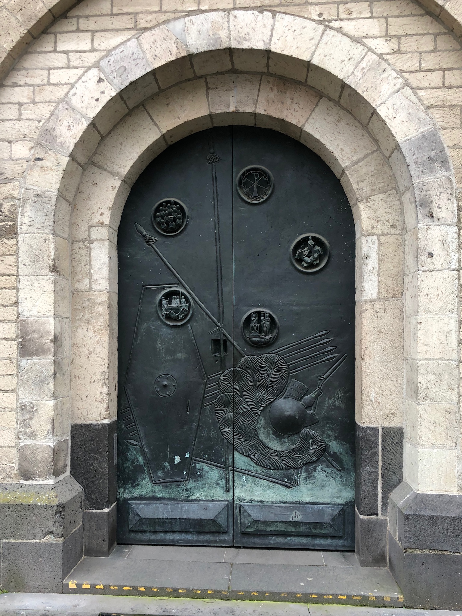 Osttor mit Bronzetür der Kirche St. Ursula in Köln aus der Mitte des 19. Jahrhunderts